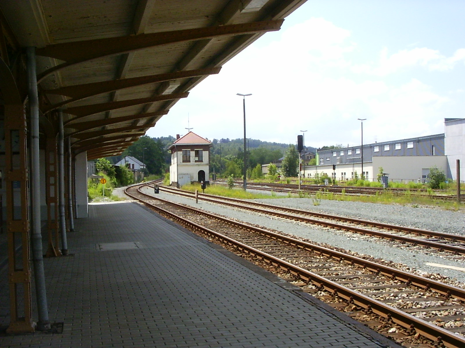 Stellwerk (hinten) und Bahnhof (vorne) in Adorf, Vogtland